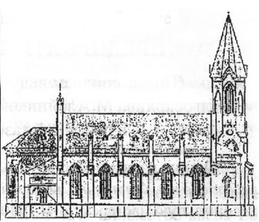 Беларуская (тарашкевіца): Рагачоў (Rahačoŭ), вуліца Касьцельная (vulica Kaścielnaja). Касьцёл Сьвятога Антонія Падуанскага